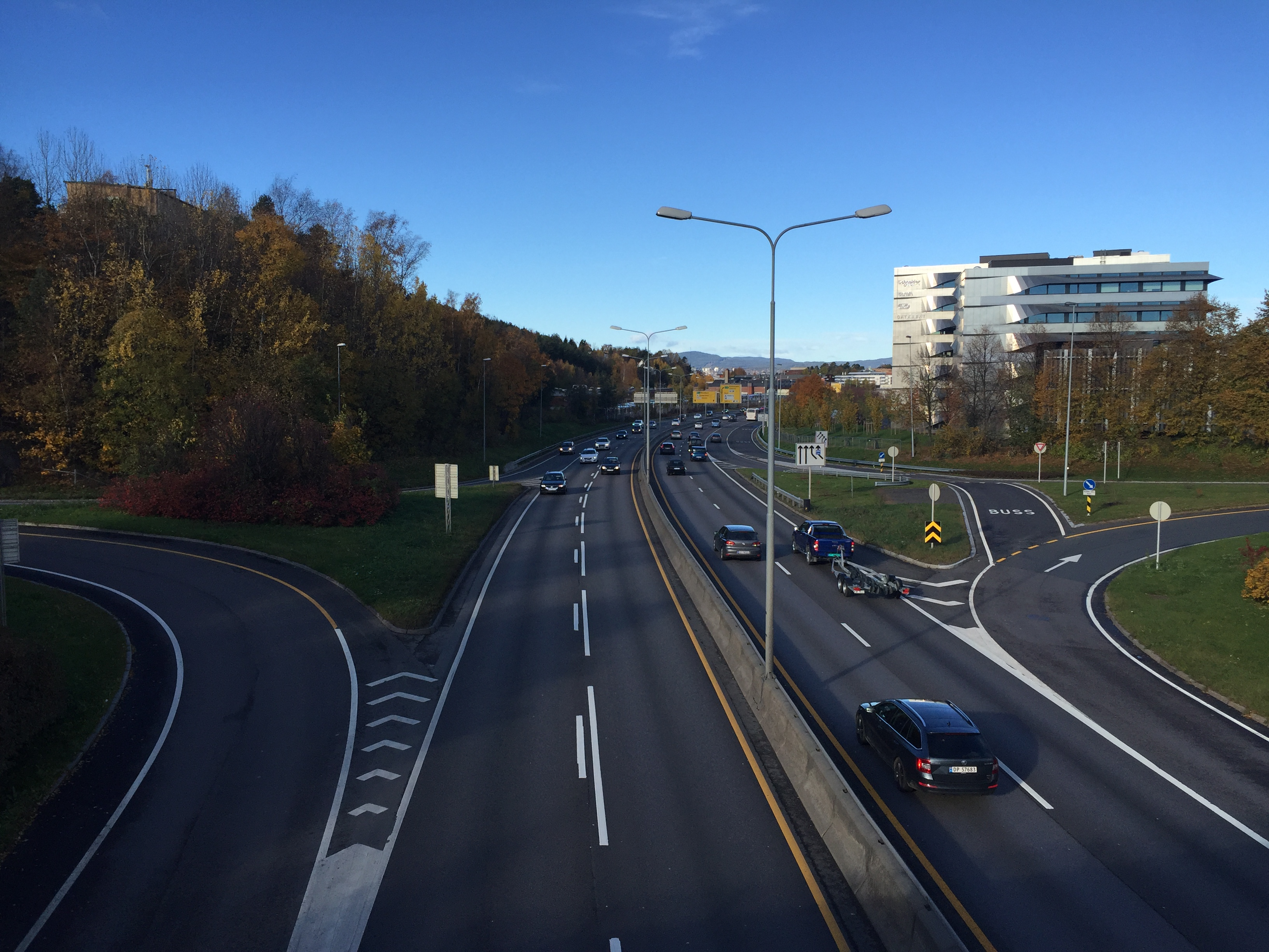 E6 ved Brattlikollen i Oslo.